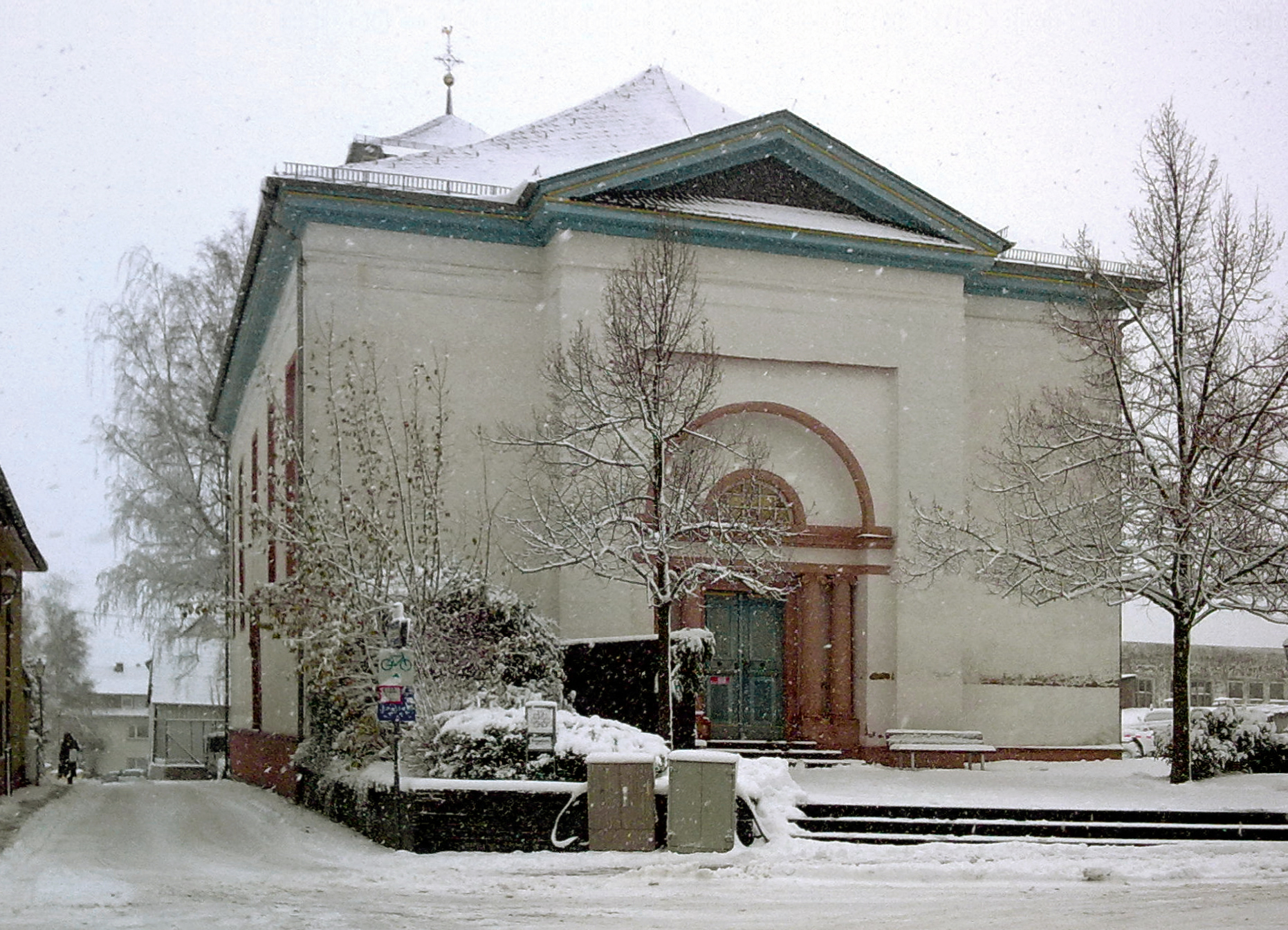 Die Ev. Kirche in Taunusstein-Wehen. Erbaut nach Plänen von Baurat Carl Florian Goetz 1810-1812. Fassadengestaltung unter dem Einfluss von Christian Zais.